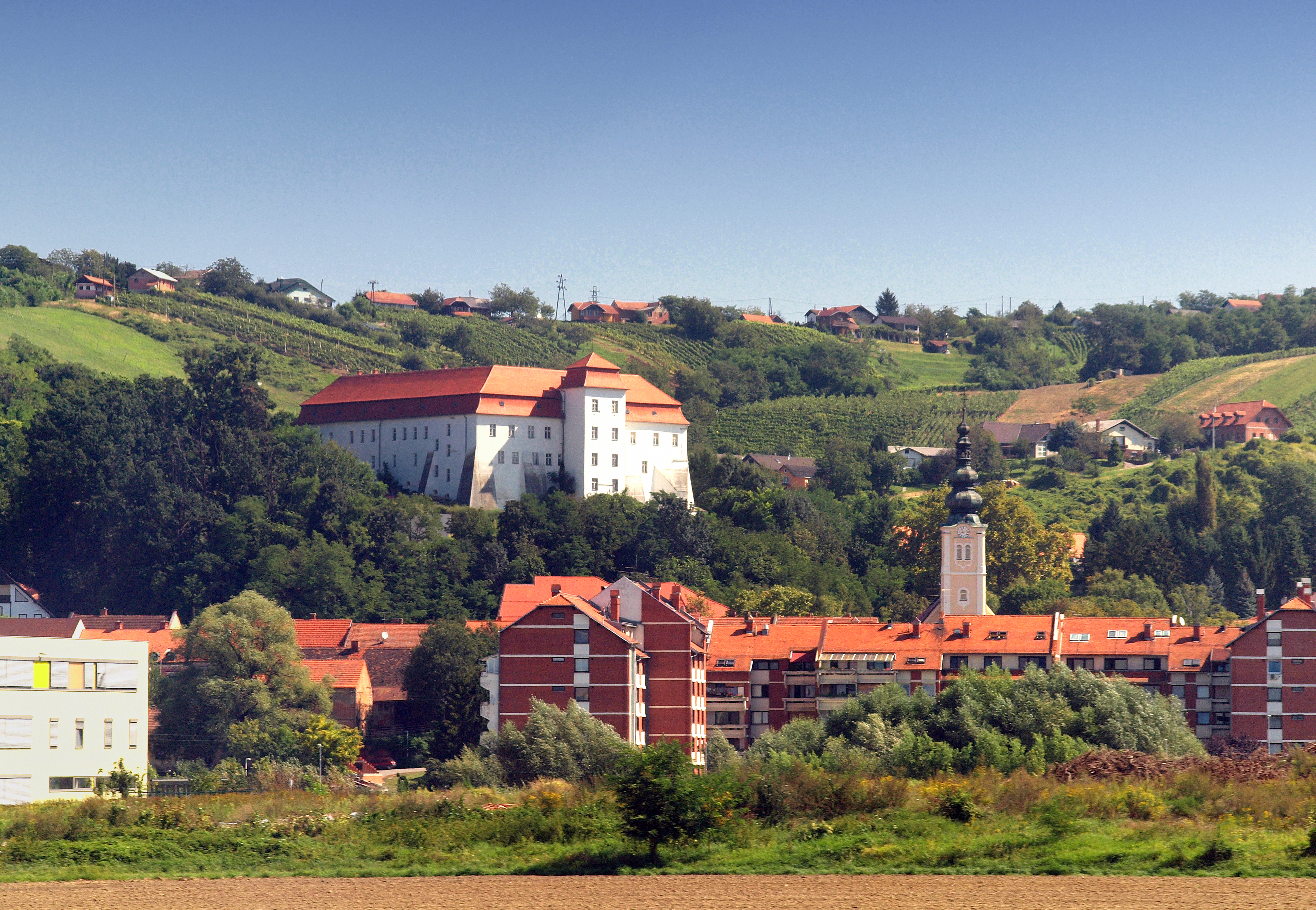 Lendava - Le château